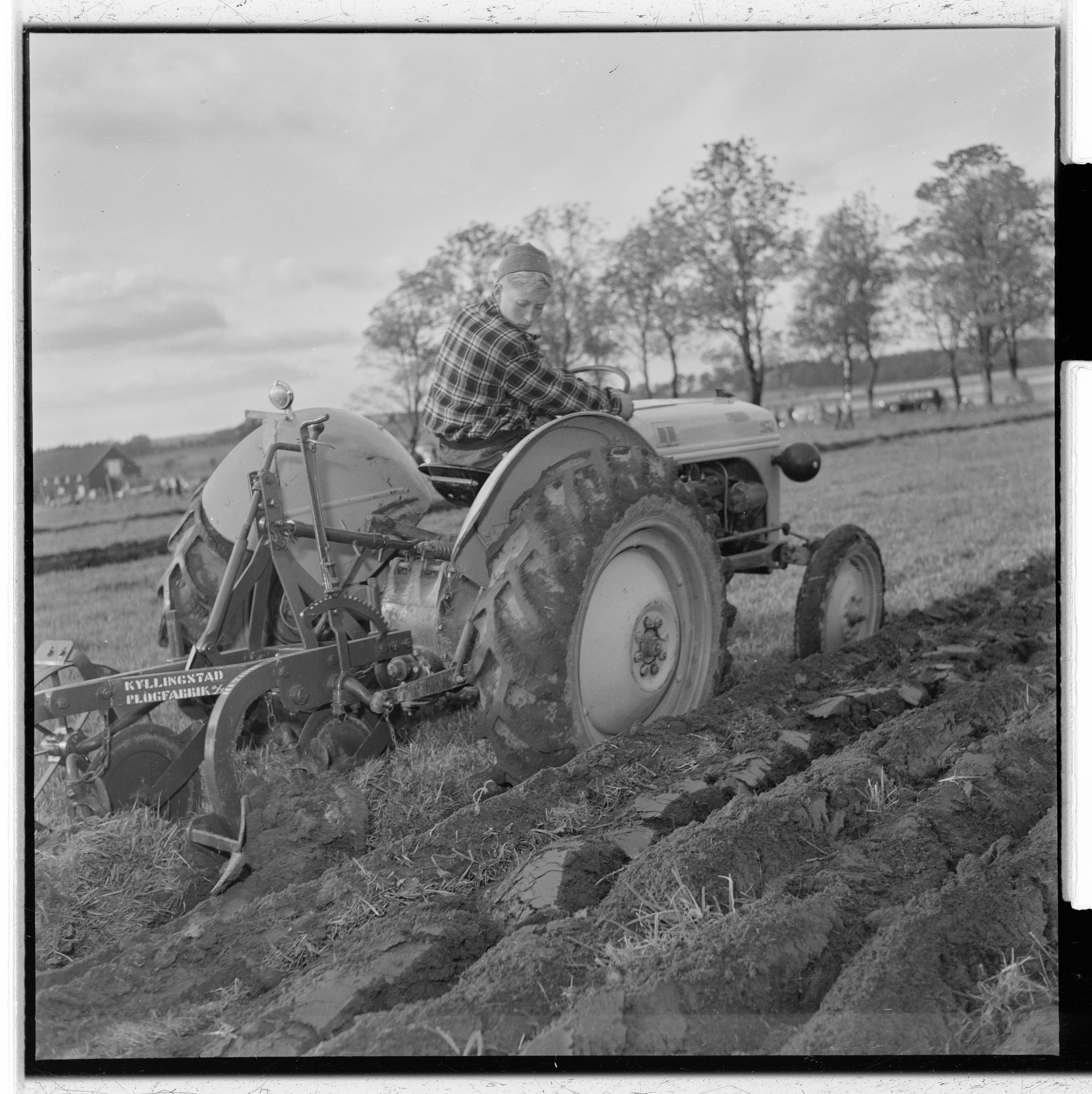 Bildet er hentet fra Arkivverket. Pløying med traktor. Yrkestevlinger, jordbruk. Nordisk stevne, Tønsberg. NÅ nr. 21, 1952 Arkivinstitusjon : Riksarkivet Arkivnavn : Billedbladet NÅ Sted : Norge, Vestfold, Tønsberg, Emneord: Traktor, Jorde, Pløying, Jordbruk, Menn, Konkurranser Avbildet